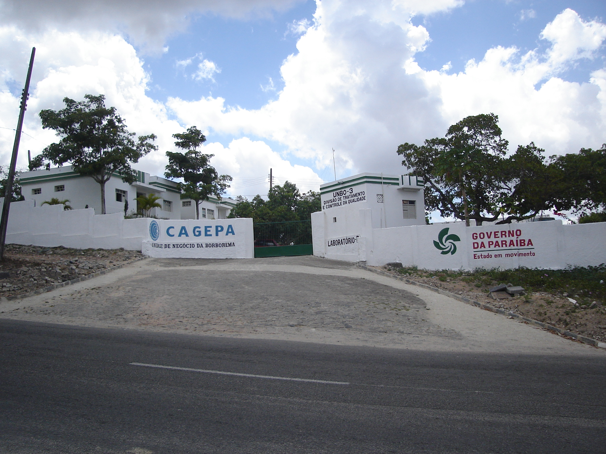 Foto da CAGEPA - Companhia de Água e Esgotos da Paraíba, no bairro do Alto Branco, em Campina Grande - PB Brasil. Foto tirada por Brunosprak 09:51, 12 Março 2006 (UTC)